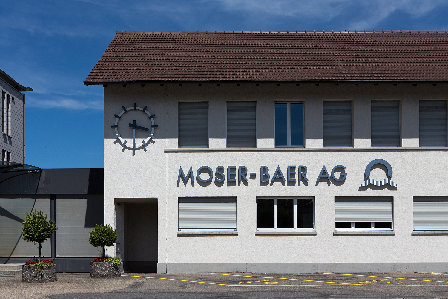 Die Uhrenfabrik Moser-Baer AG (Mobatime) in Sumiswald ist bekannt wegen der Schweizer Bahnhofsuhr.